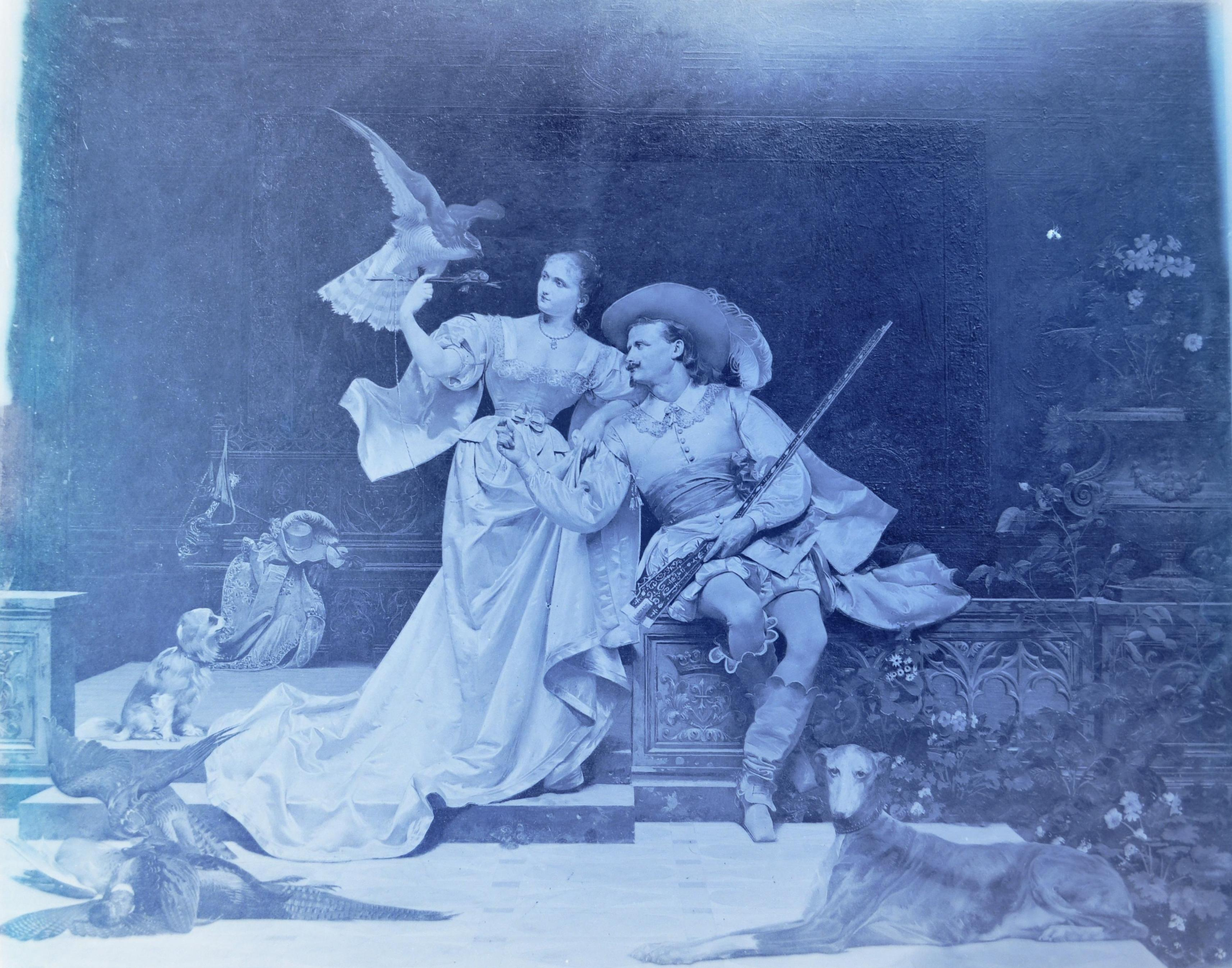 Plaque photographique du tableau Après la chasse.